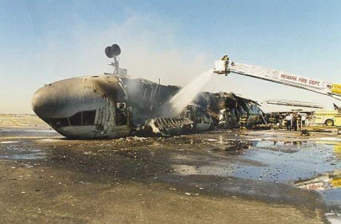 Fedex Flight 14（N611FE） wreckage